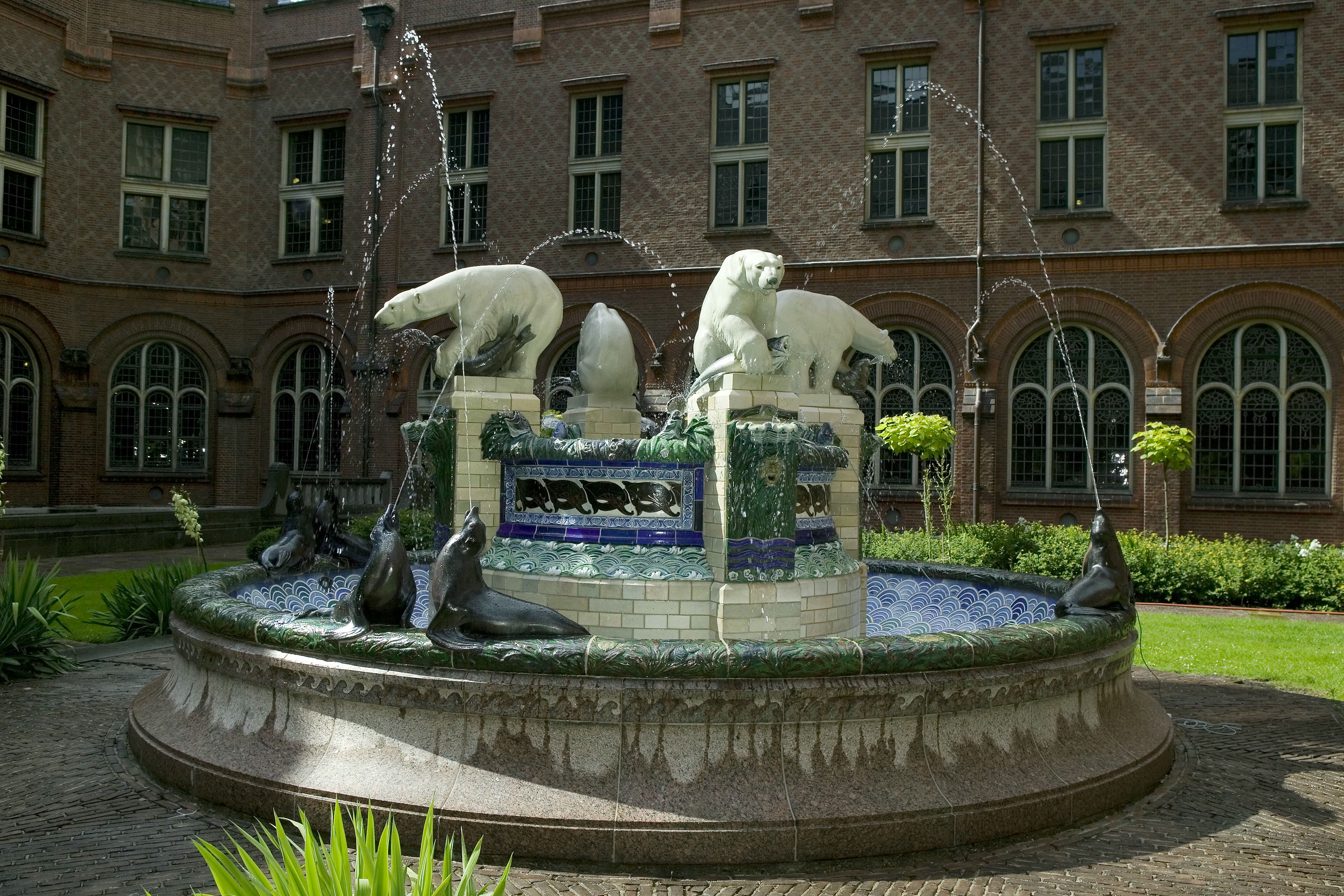 Het Vredespaleis: Overzicht van de fontein, in 1920 vervaardigd van Kopenhaags porcelein (opmerking: Gepubliceerd in de Nieuwsbrief van september 2007, nummer 5)